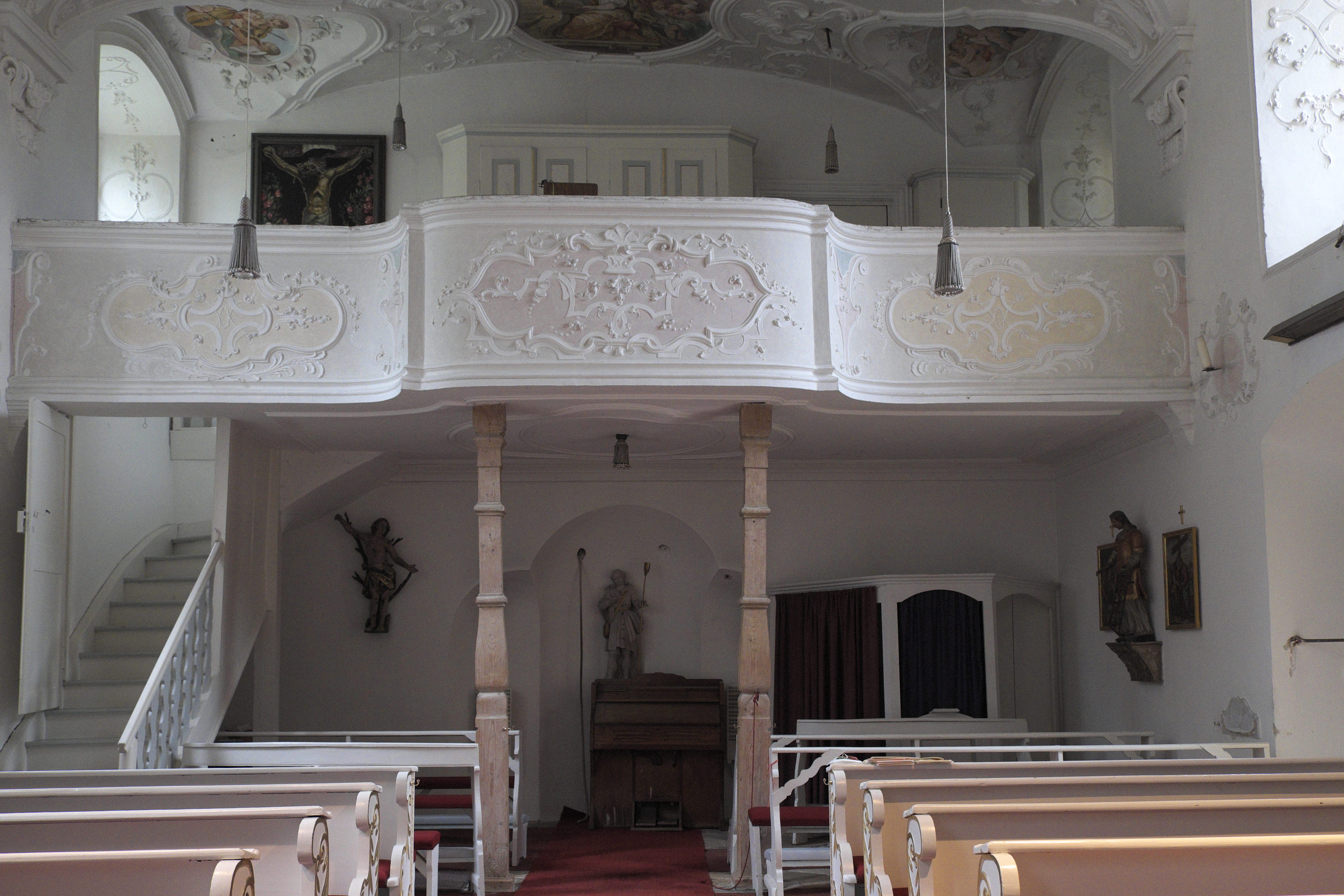 Ehemaliges Deutschordensschloss, Schloss Blumenthal, in Klingen, einem Stadtteil von Aichach im Landkreis Aichach-Friedberg (Bayern), ehemalige Schlosskapelle, katholische Filialkirche St. Maria, Empore